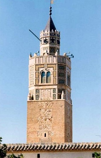 Mosche